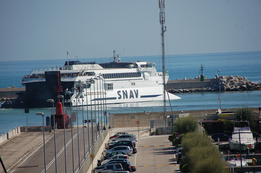 Pescara